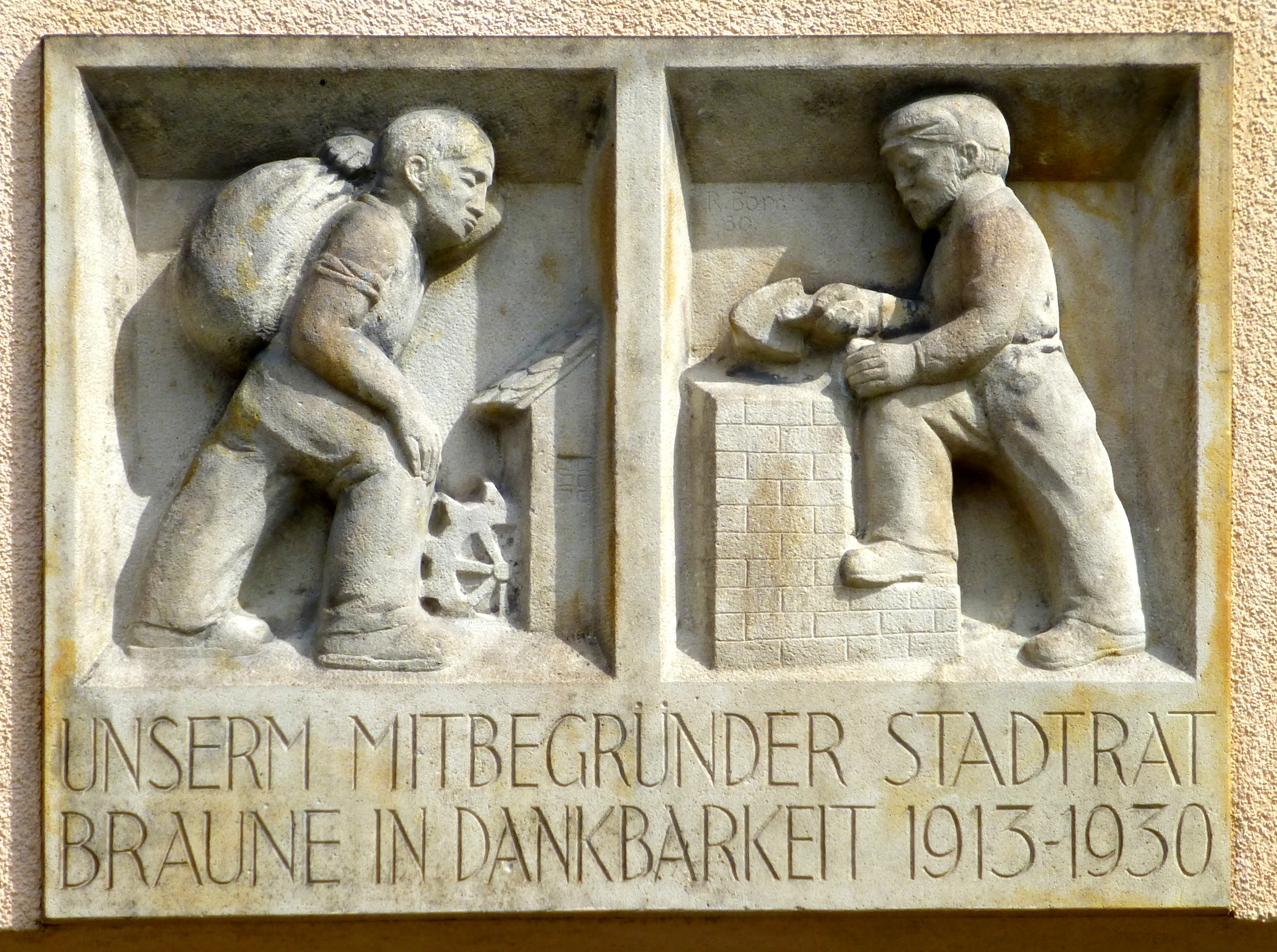 Gedenktafel für Ernst Braune in der von ihm mitbegründeten genossenschaftlichen Wohn-Siedlung Radeberg, am Gebäude Gartenstraße 39-41, um 1930